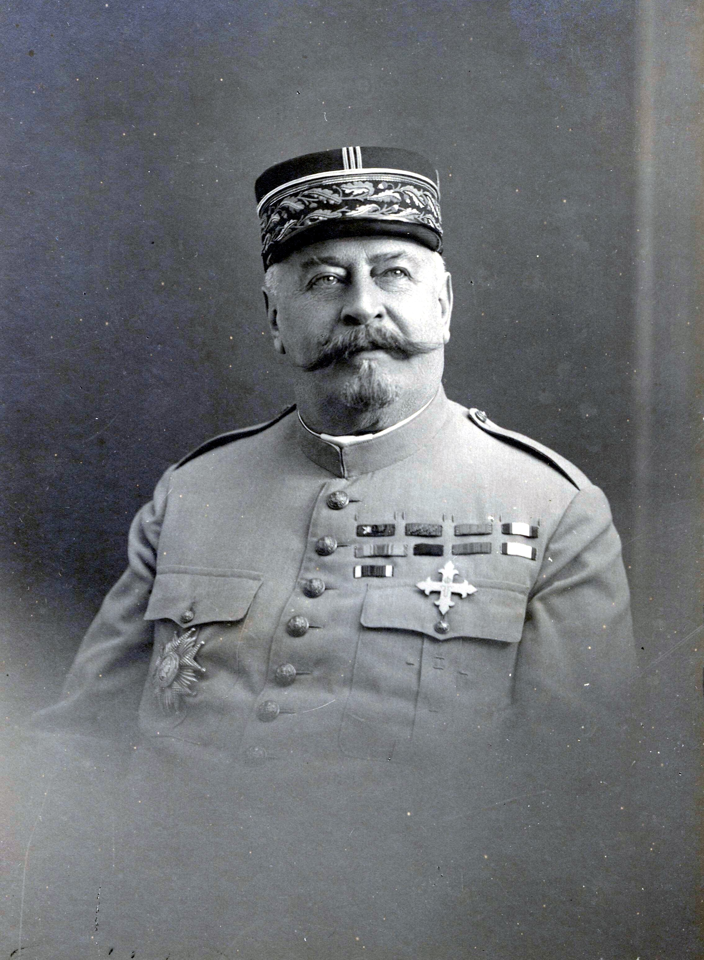 Le général Berthelot en tant que gouverneur militaire de Metz en 1920.